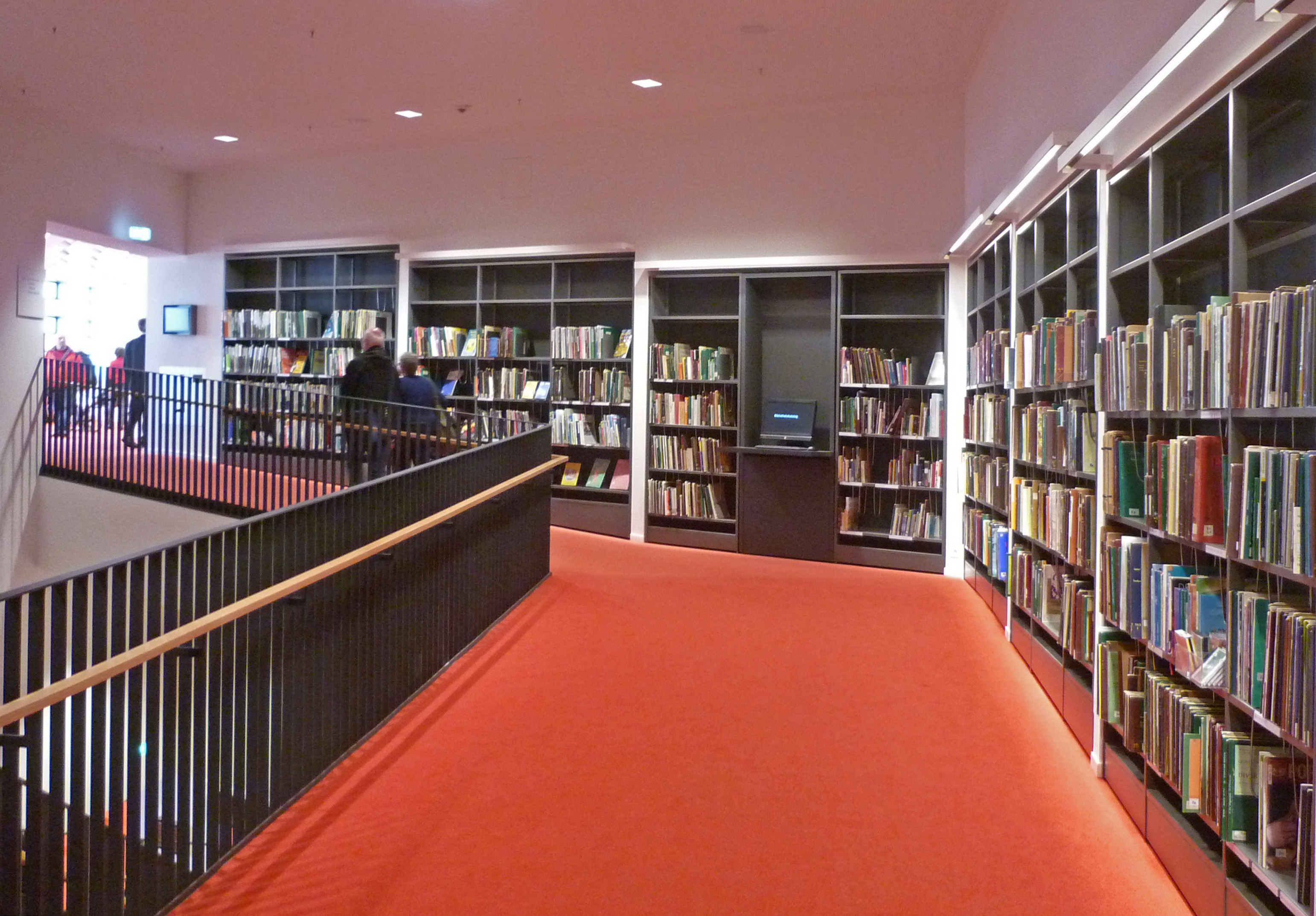 Kulturpalast Dresden nach der Wiedereröffnung am 28. April 2017: Stadtbibliothek Dresden